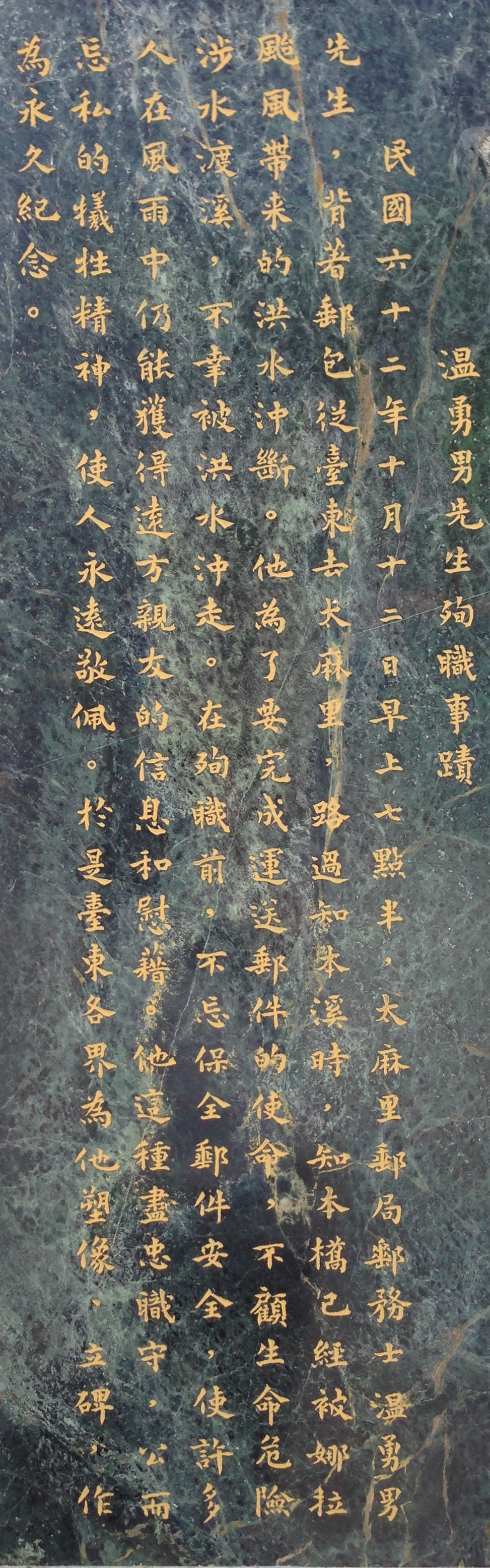 中文（台灣）: 溫勇男銅像碑文